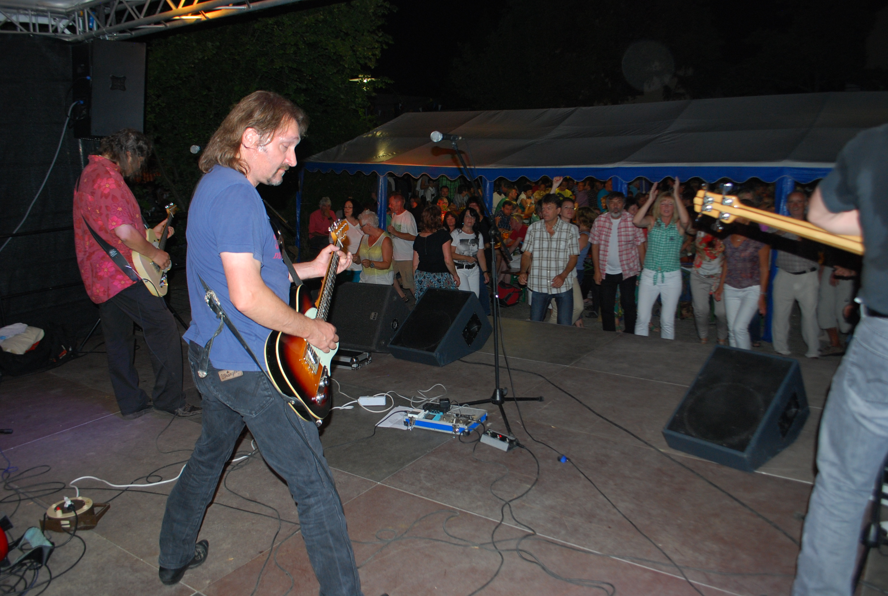 Bürgerfest Wörth Donau